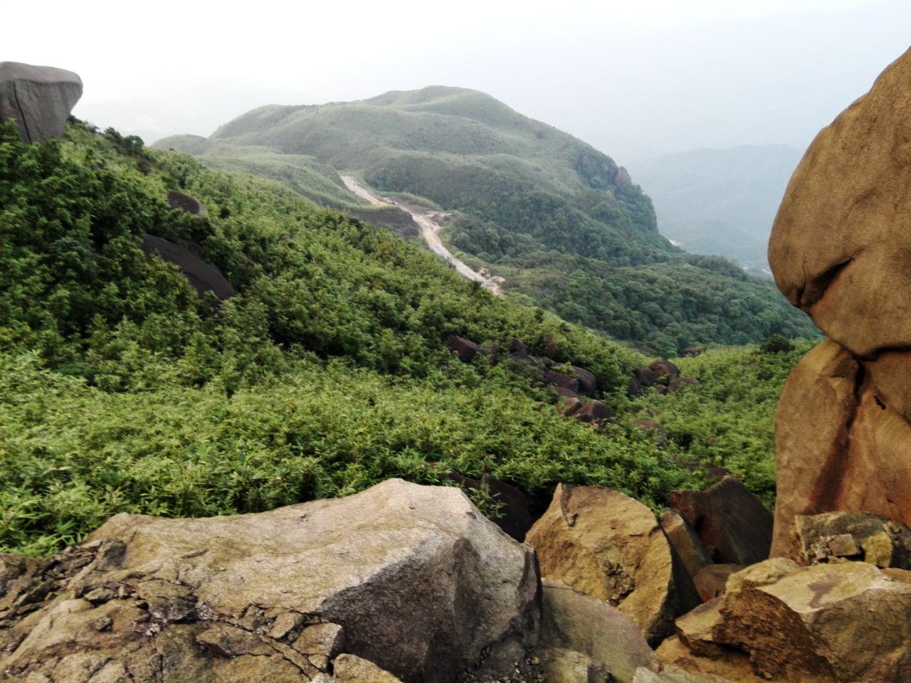 茂名电白鹅凰嶂越野穿越20140613-14